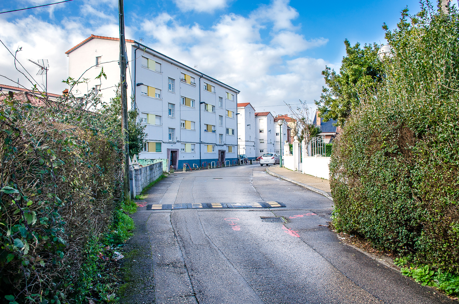 Barrio Insa. Calle Coteríos de Tanos antes de la obra de urbanización de 2018. España.